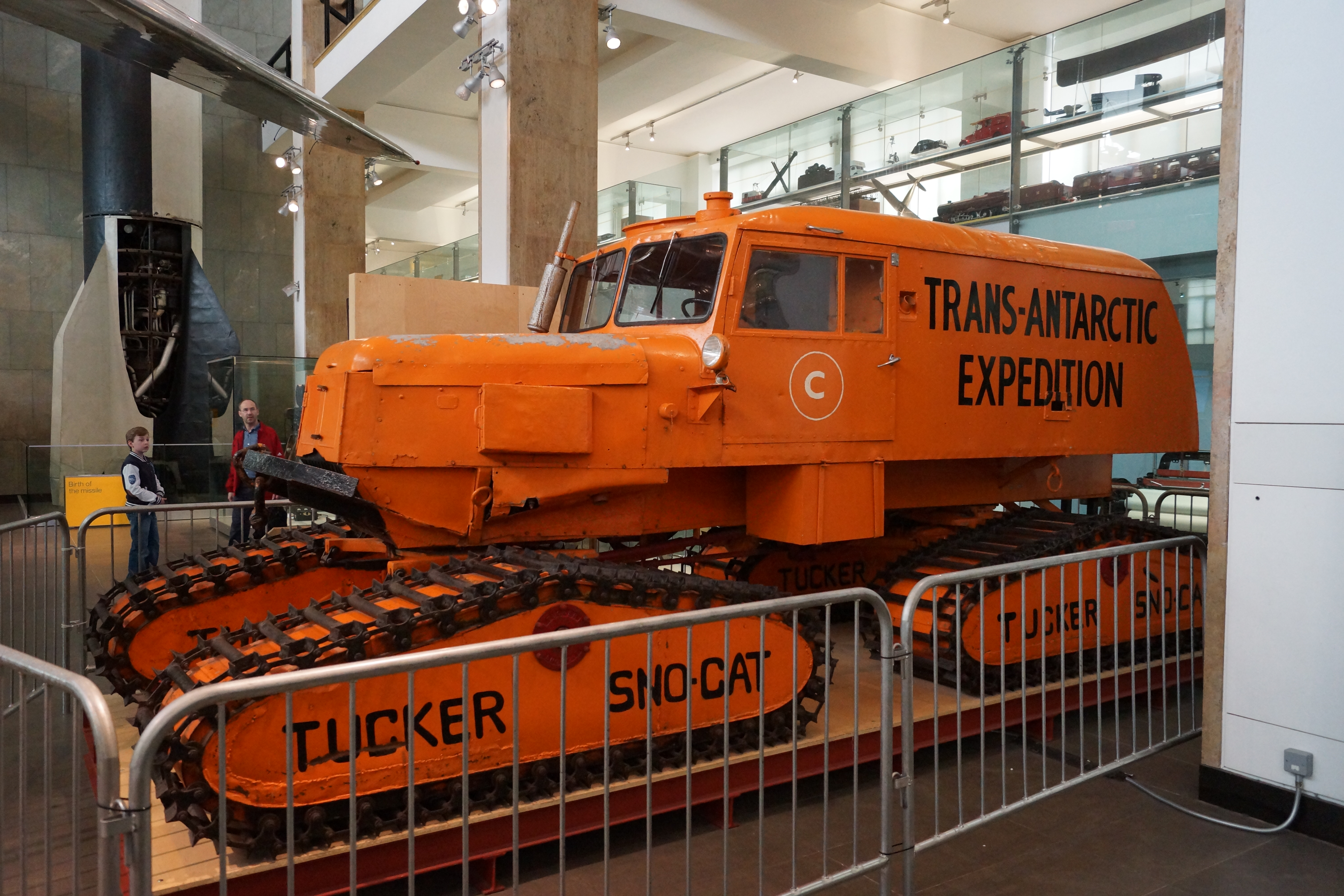 Der Urvater der Pistenraupe, die Tucker SNO-CAT, aufgenommen im National Science Museum in London.